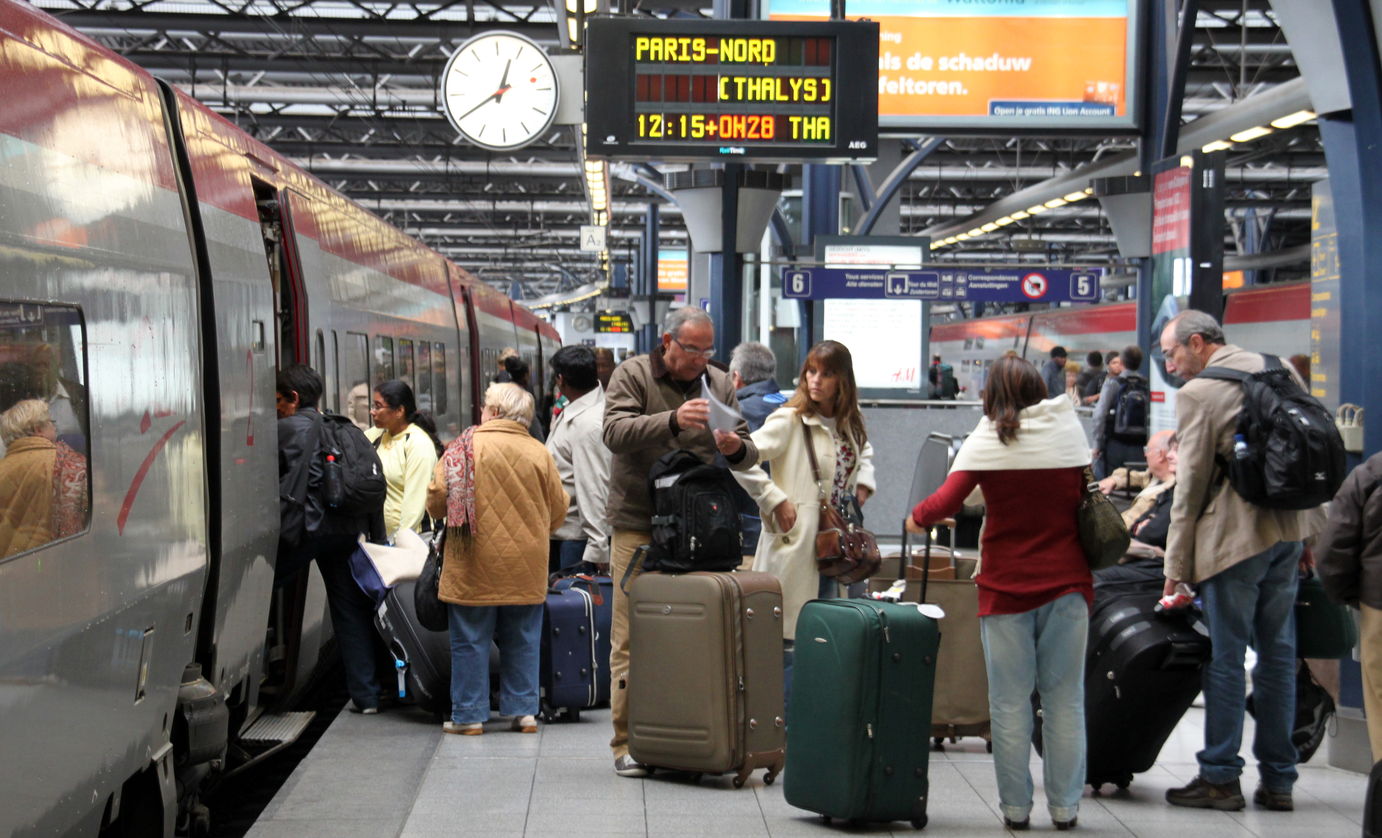 Reizigers stappen in de Thalys naar Parijs op het station van Brussel-Zuid.